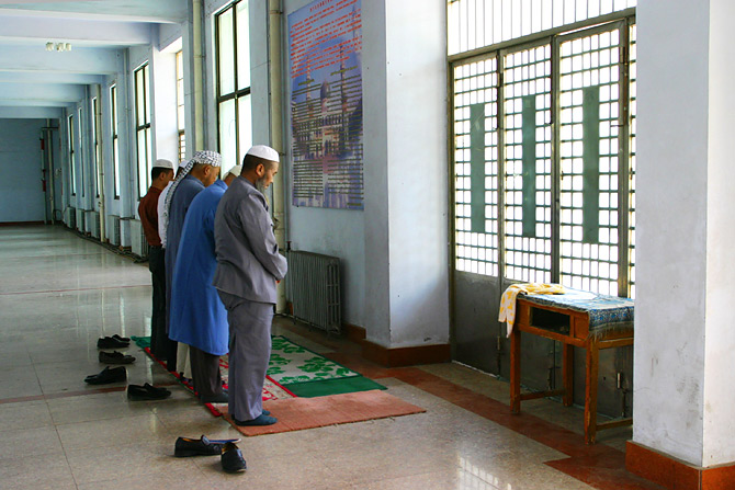 Prayers at Dongguan mosque, Xining, Qinghai, China